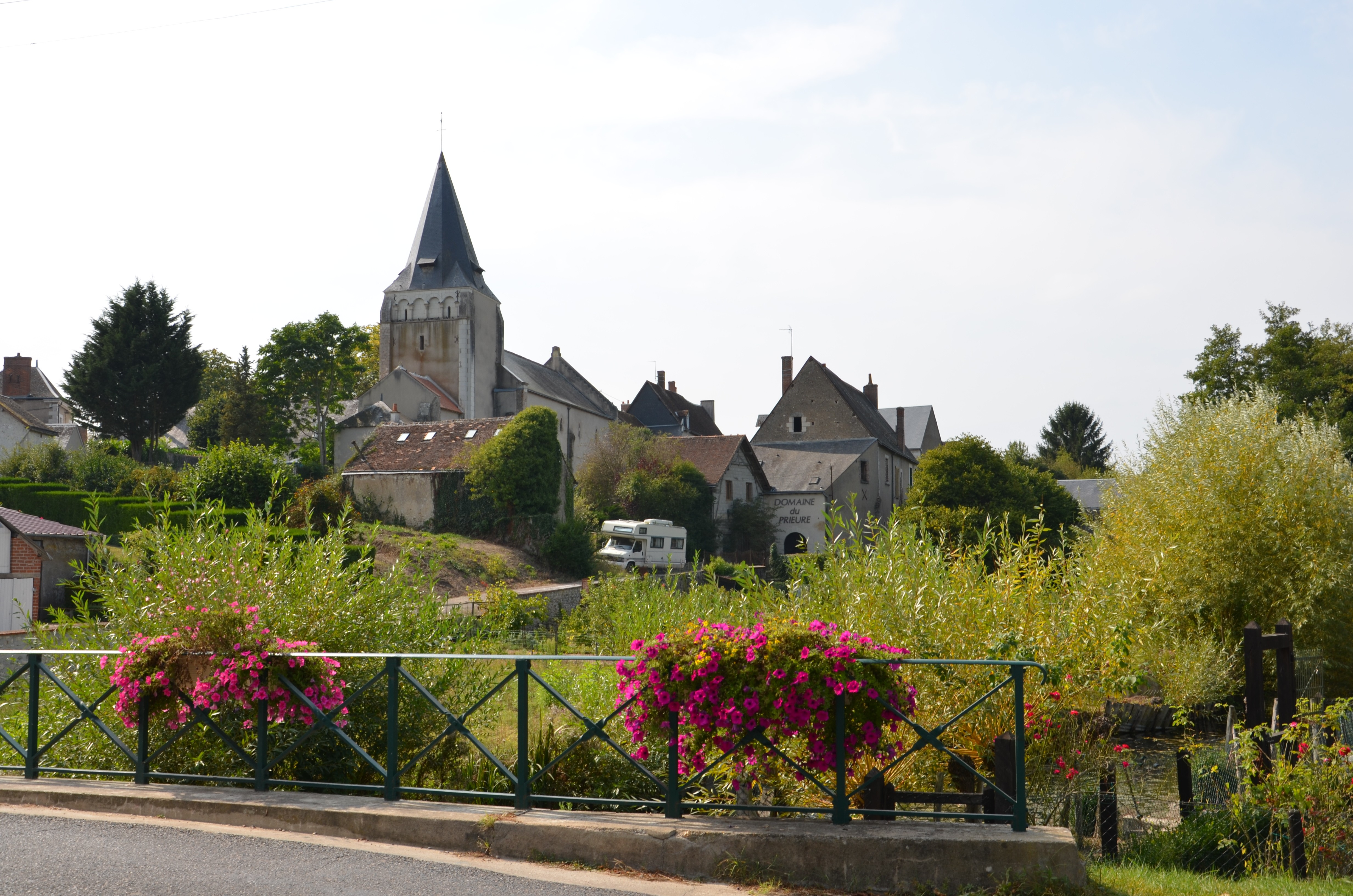 Vue du pont face à l'église